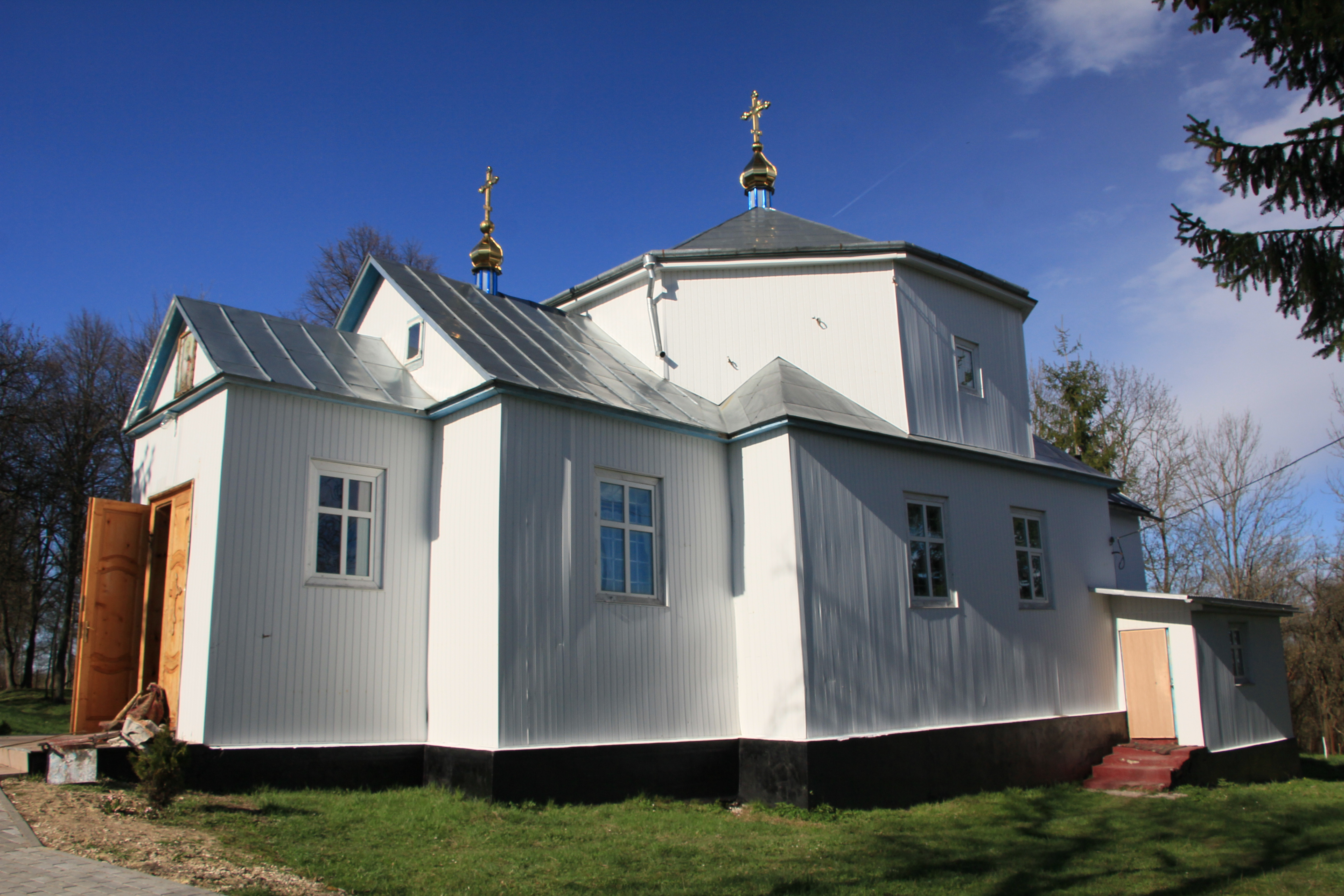 Дерев'яна церква в селі Старий Олексинець Кременецького району Тернопільської області